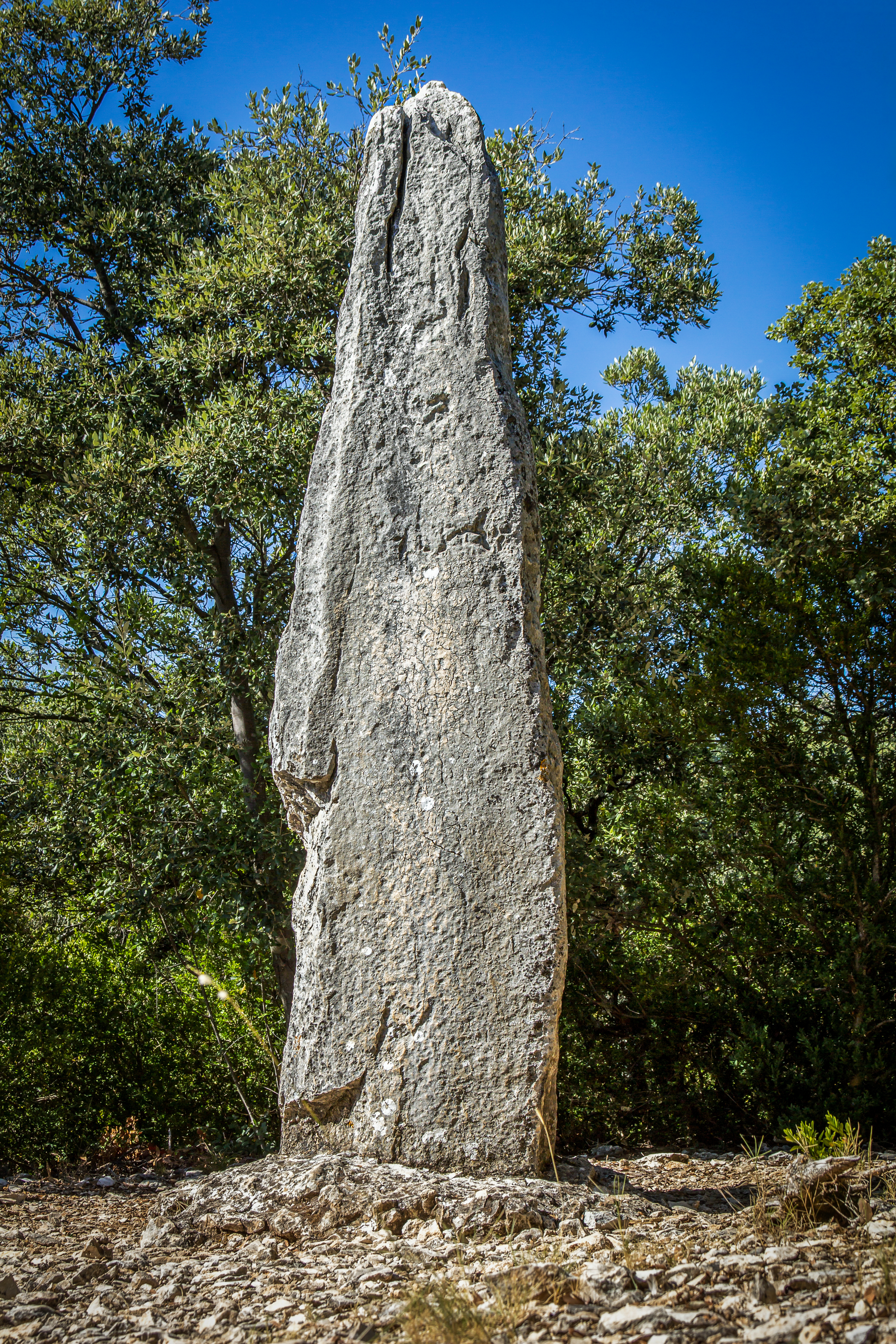 Menhir (Hinkelstein) Grosse Pierre, Route des Gorges 07700 Saint-Marcel-d'Ardèche